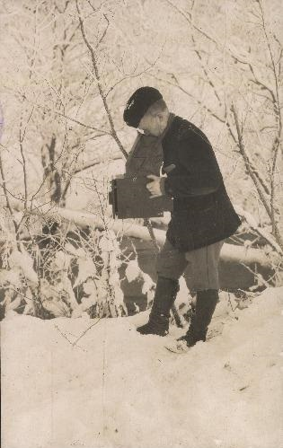 Veltveebel Karl Hugo Akel Vene 23.korpuse lennusalga fotograafina Esimese maailmasõja ajal.